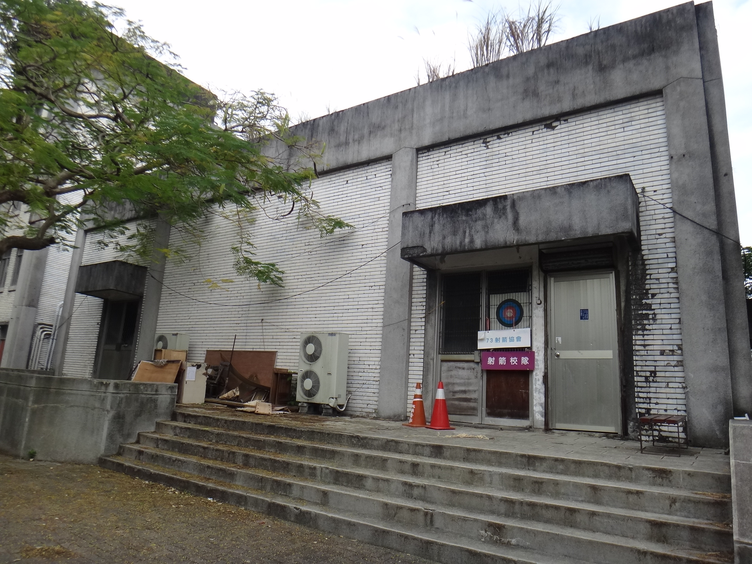 國立臺灣大學綜合大禮堂，2006年燒毀後棄置。